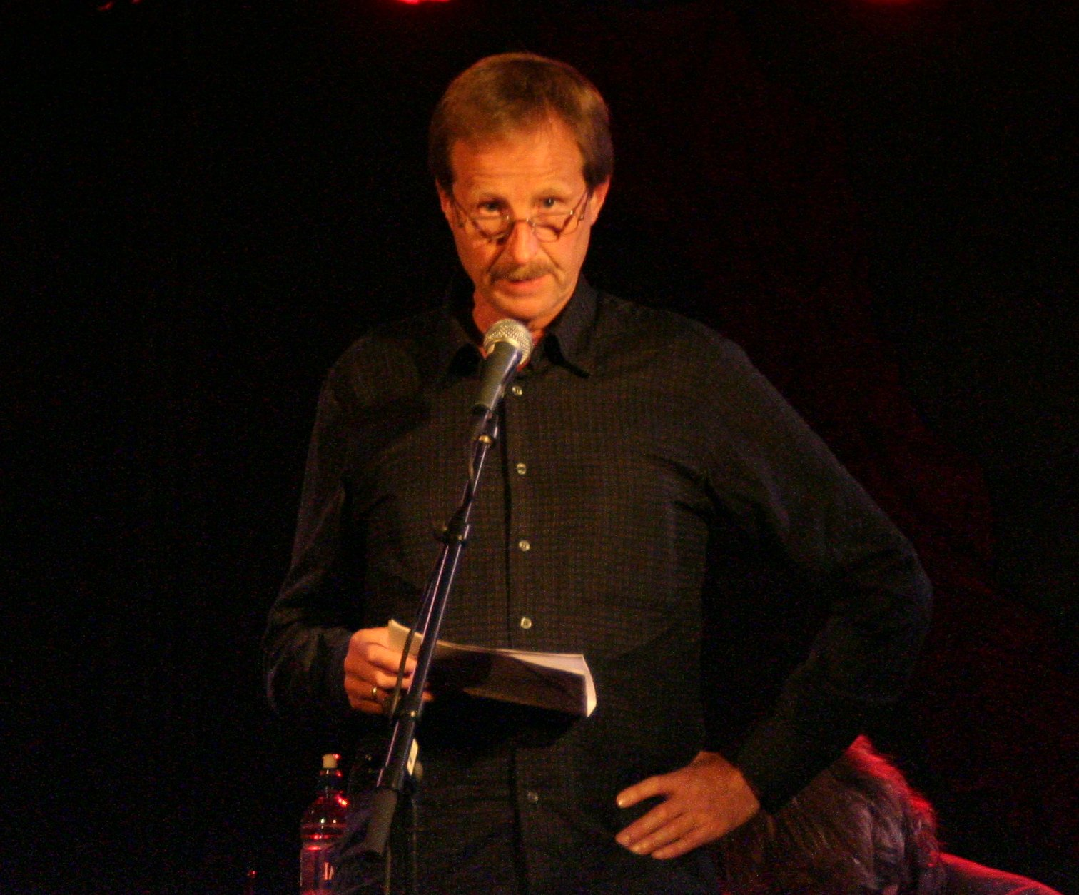 Norwegian writer Kjartan Fløgstad